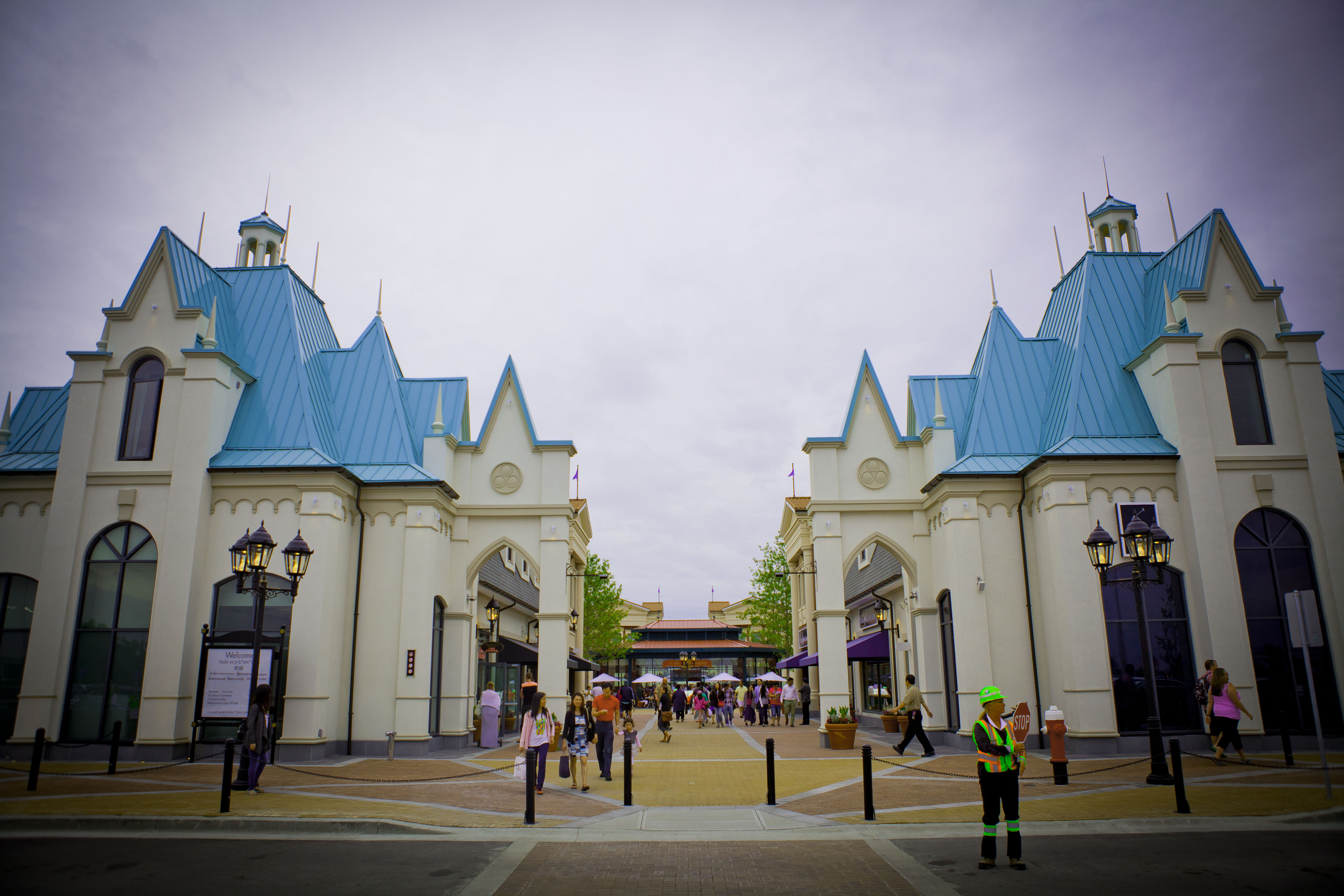 McArthurGlen Designer Outlet Vancouver Airport